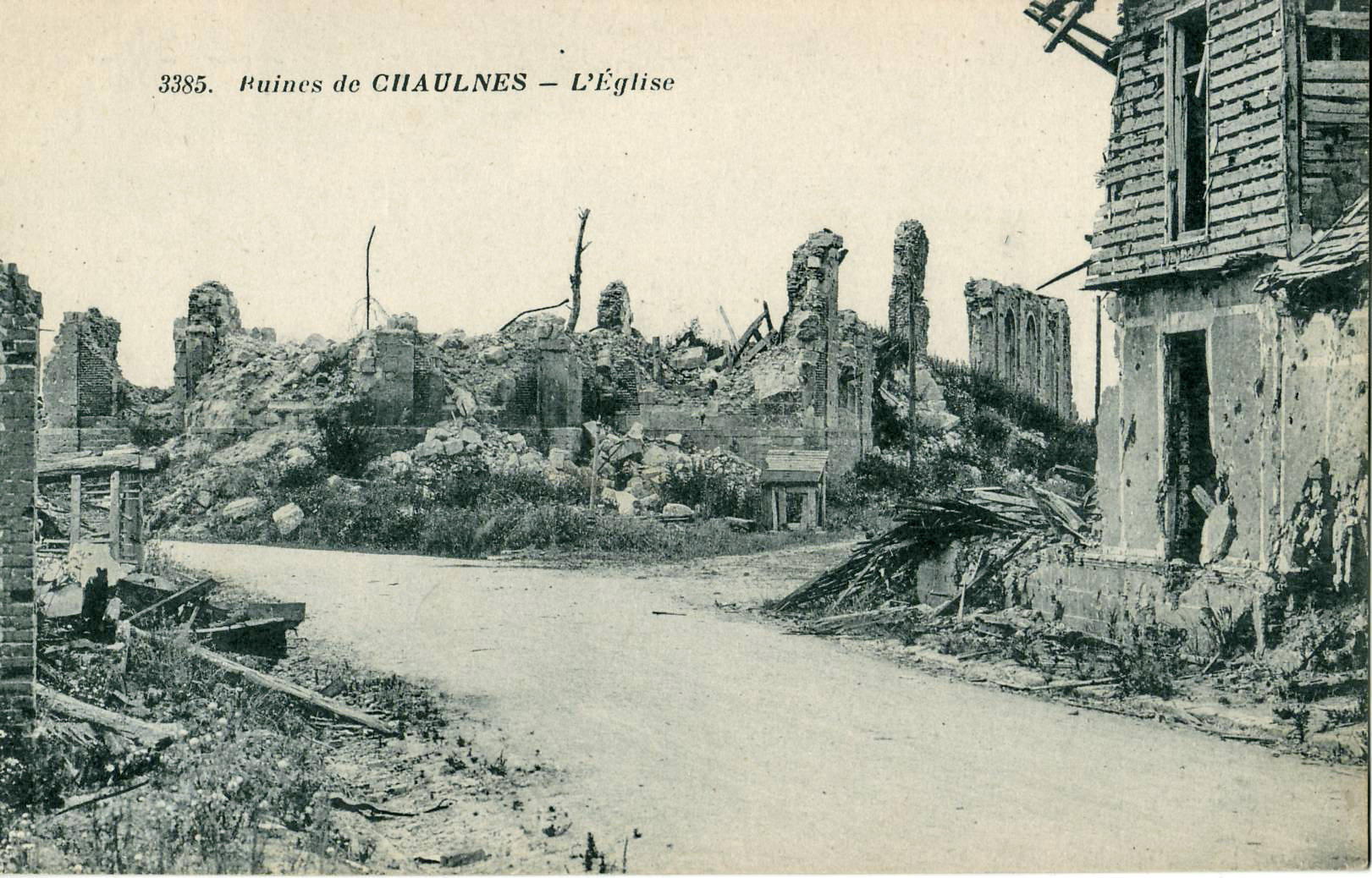 Carte postale éditée par Beaudinière, n°3385 :CHAULNES - Ruines de Chaulnes - L'Eglise